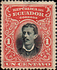 Stamp Number EC 145